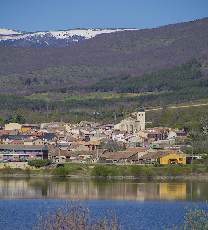 Vista general del pueblo de Lozoya desde el embalse de Pinilla, en la Comunidad de Madrid, España